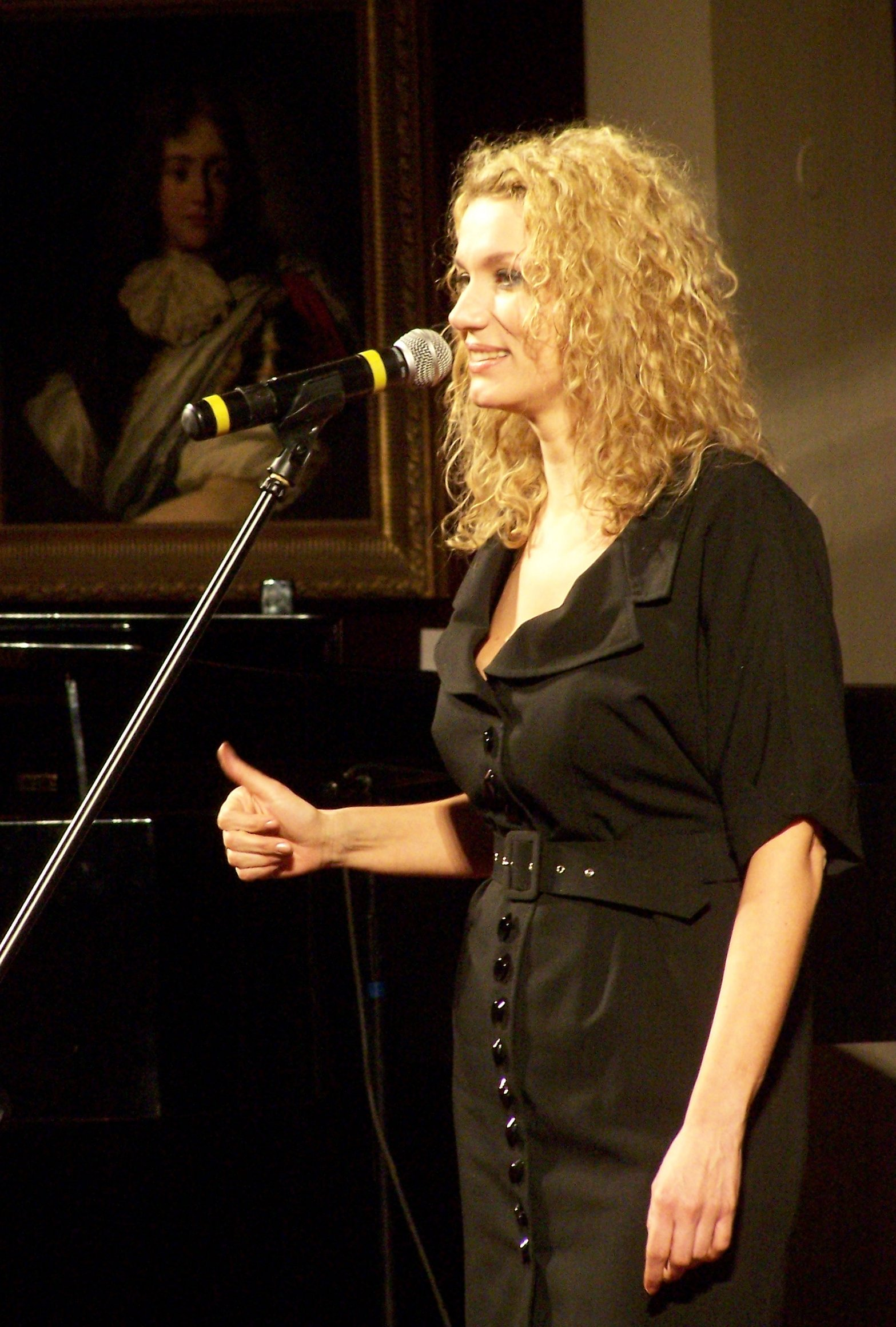 Joanna Trzepiecińska, występująca na uroczystości wręczenia nagród w konkursie "Kwiaty dla Babci i Dziadka", Galeria Porczyńskich, Warszawa